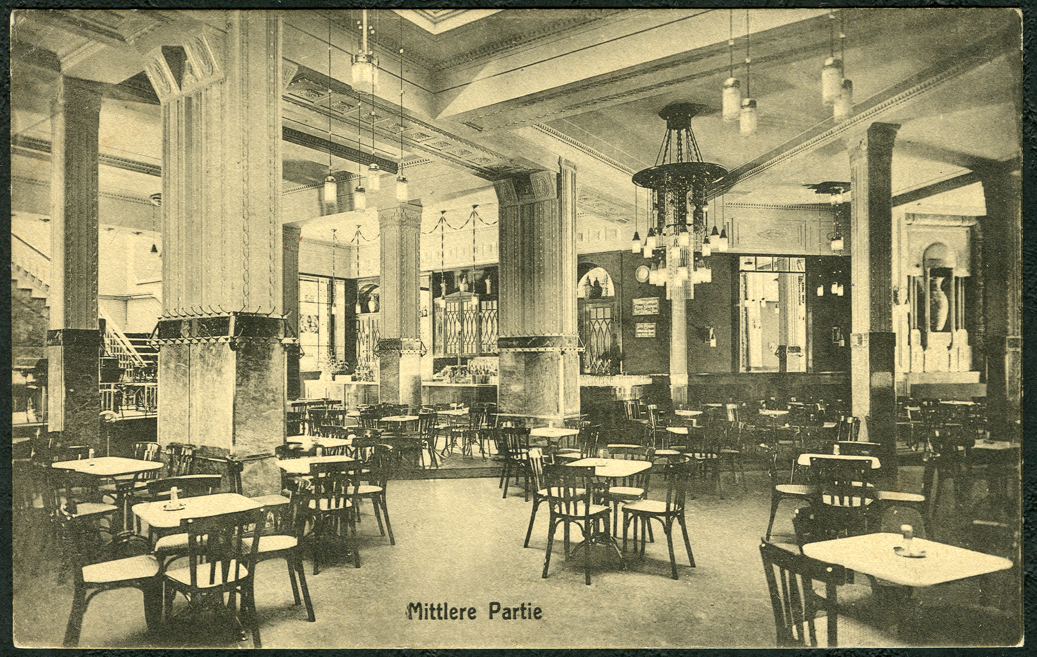 Innenaufnahme vom Café Continental in Hannover, „Mittlere Partie“